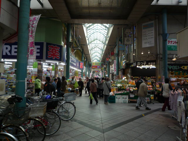 衣笠仲通り商店街の画像